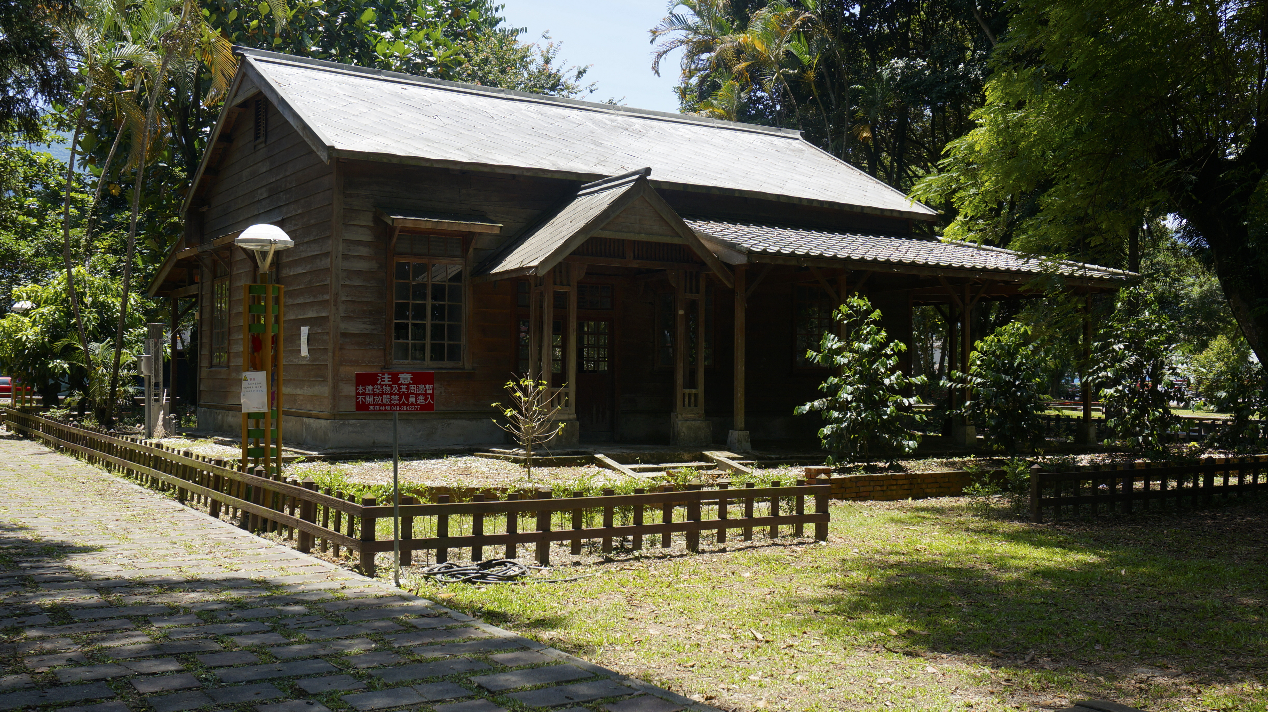 中文（台灣）: 原北海道帝國大學農學部附屬台灣演習林辦公室, 南投縣埔里鎮演習林公園